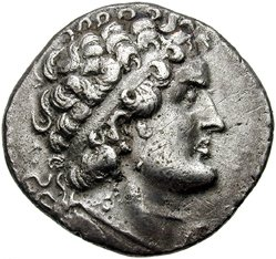 Portret van Ptolemeus VI op een zilveren tertradrachme (27mm, 13,9g) geslagen in Paphos rond 161/2 v. Chr.. Op de keerzijde een adelaar met het opschrift BASILEWS PTOLEMAIOU (BASILEOOS PTOLEMAIOU=koning Ptolemeüs).